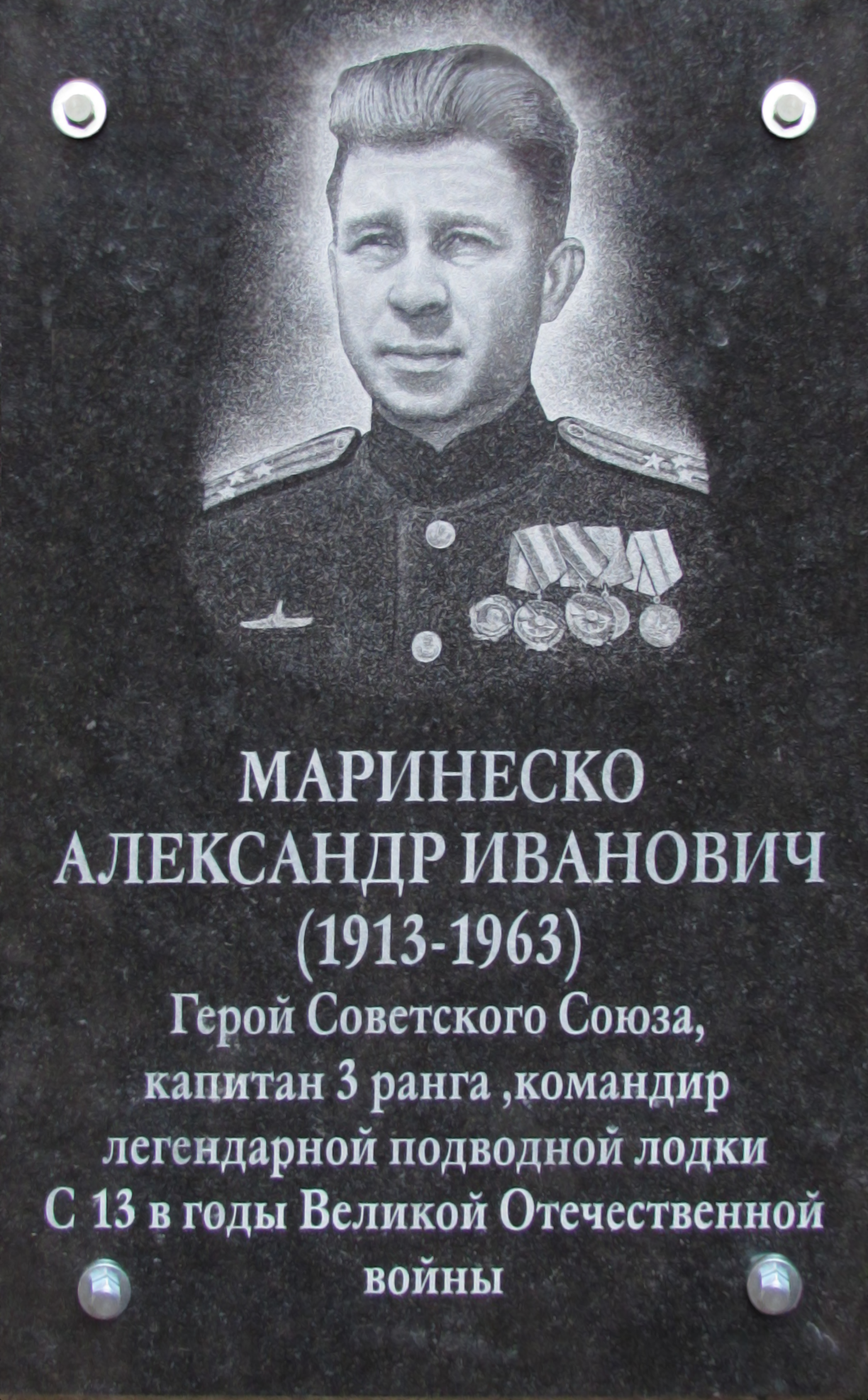 В 2016 году на фасаде часовни Резиденции русского путешественника Фёдора Конюхова, в Москве, «Союзом Военных Моряков» была установлена мемориальная доска в честь легендарного подводника ВМФ СССР - Александра Ивановича Маринеско.